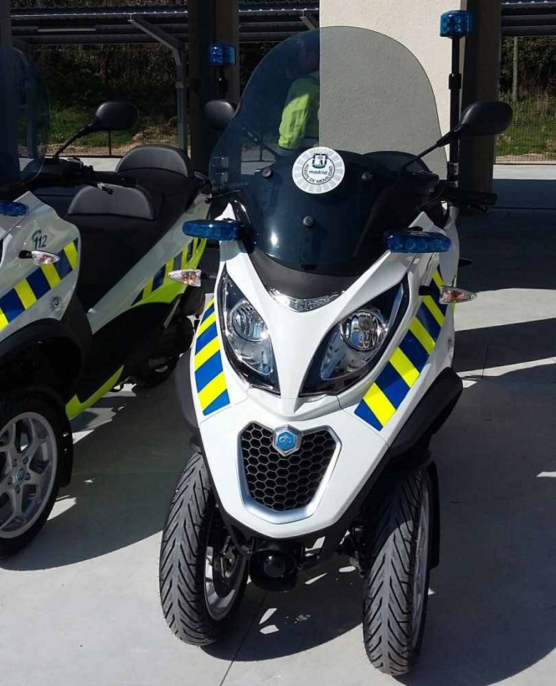 Los Agentes de Movilidad estrenan motos. Se trata de 27 unidades de tres ruedas MP3, marca Piaggio, con las que empezarán a realizar su trabajo en los próximos días. La dirección general de Gestión y Vigilancia de la Circulación, del Área de Medio Ambiente y Movilidad, está llevando a cabo una renovación de los vehículos destinados a este cuerpo, algunos de los cuales tienen más de 10 años.